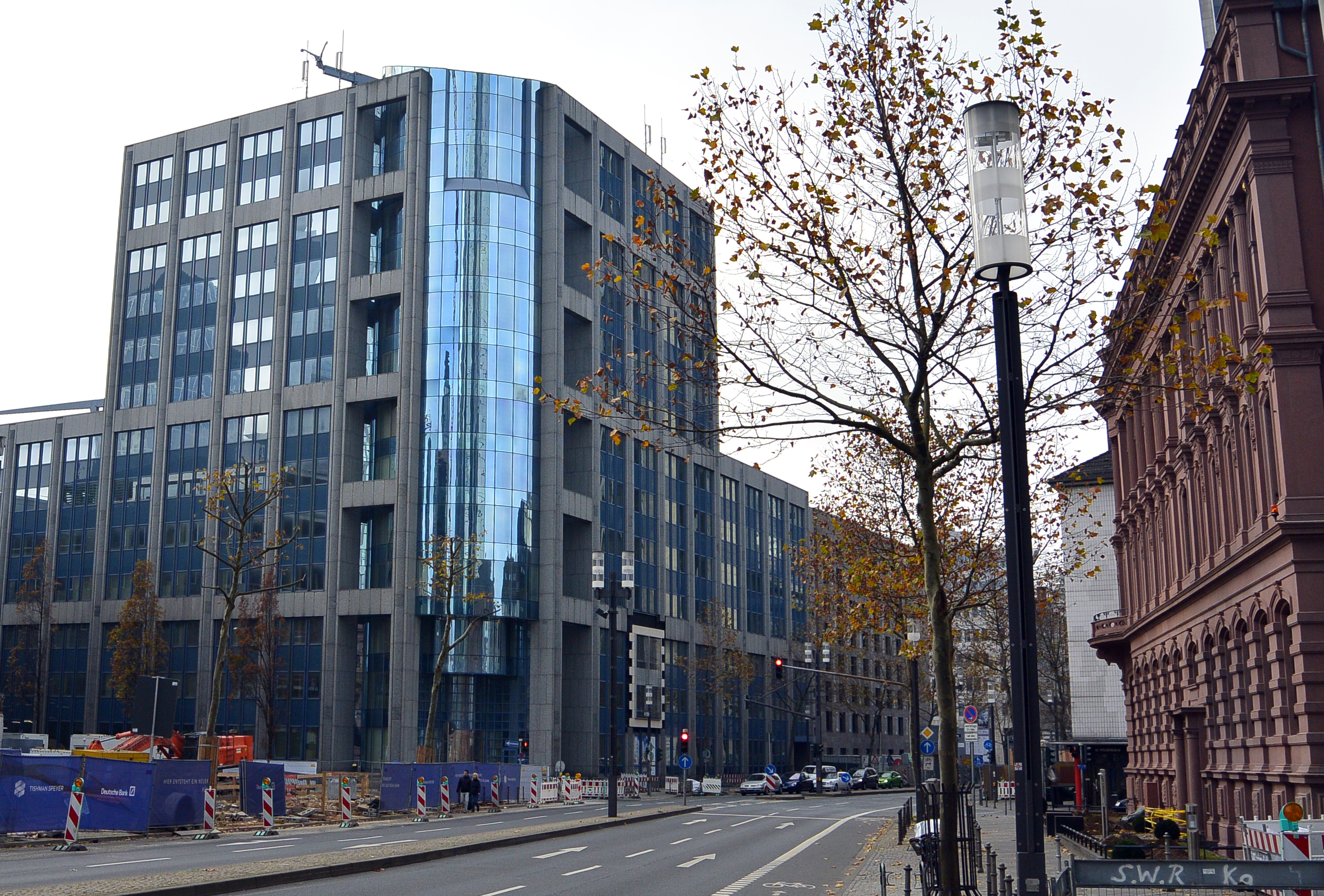 Ehemaliges Gebäude der Bayrische Vereinsbank an der Mainzer Landstraße 23 in Frankfurt. Entworfen von NHT Nägele Hofmann Tiedemann und fertiggestellt 1992.